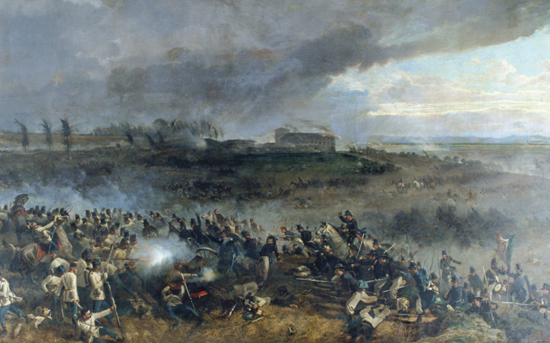 24 giugno 1859, Battaglia di San Martino. Combattimento per la presa della Cotracania